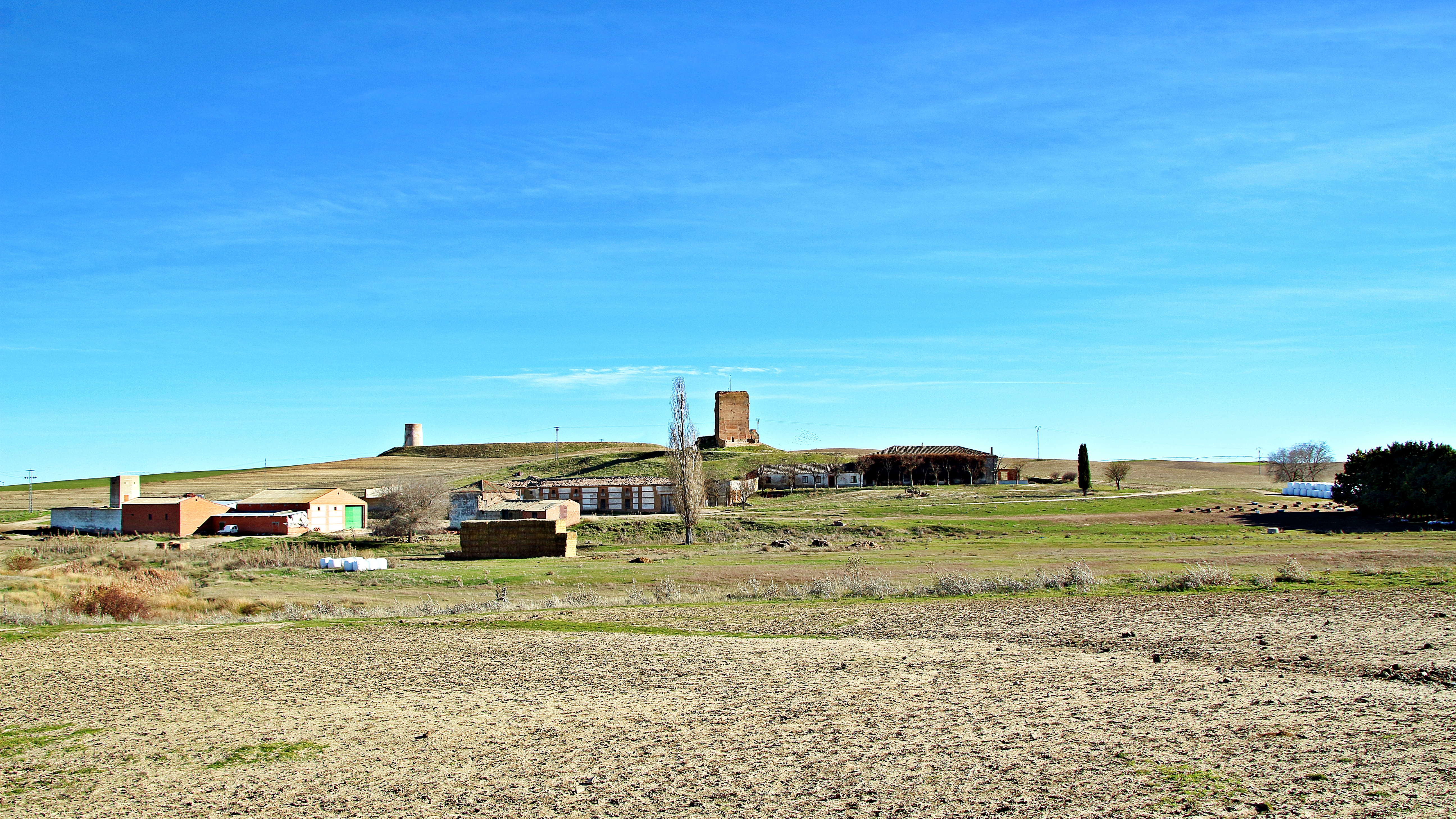 Alquería de Torralba, municipio de Cisla, comarca de La Moraña, provincia de Ávila.